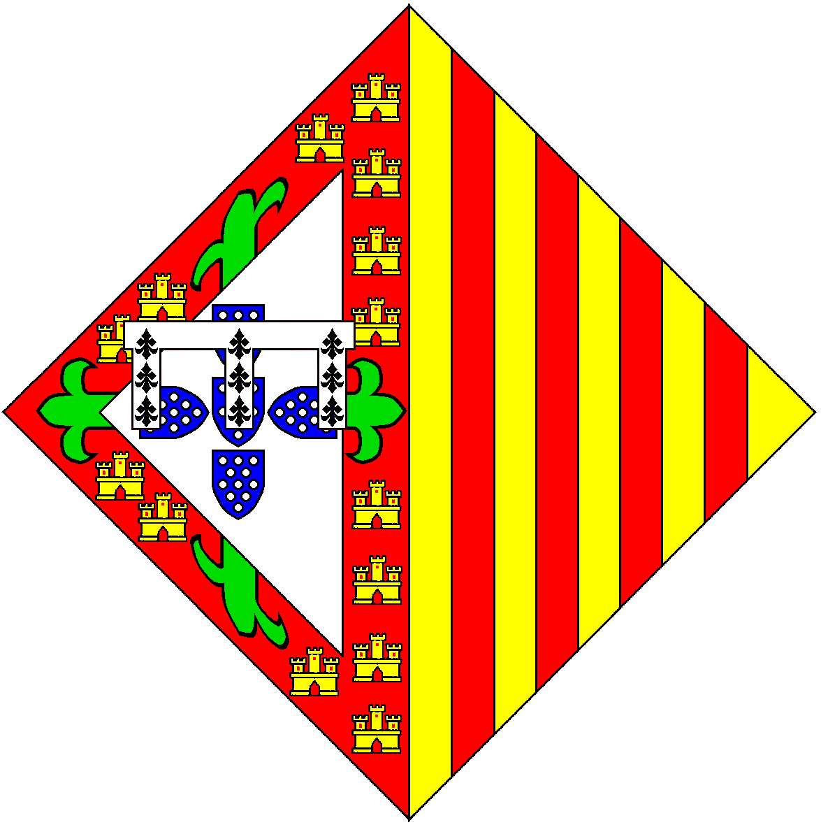 Lisonja de Armas de D. Isabel de Aragão (1409-1443), Duquesa de Coimbra e Condessa de Urgel, com lambel de prata carregado de três mosquetas de arminho nos três pendentes; segundo pleno de Aragão